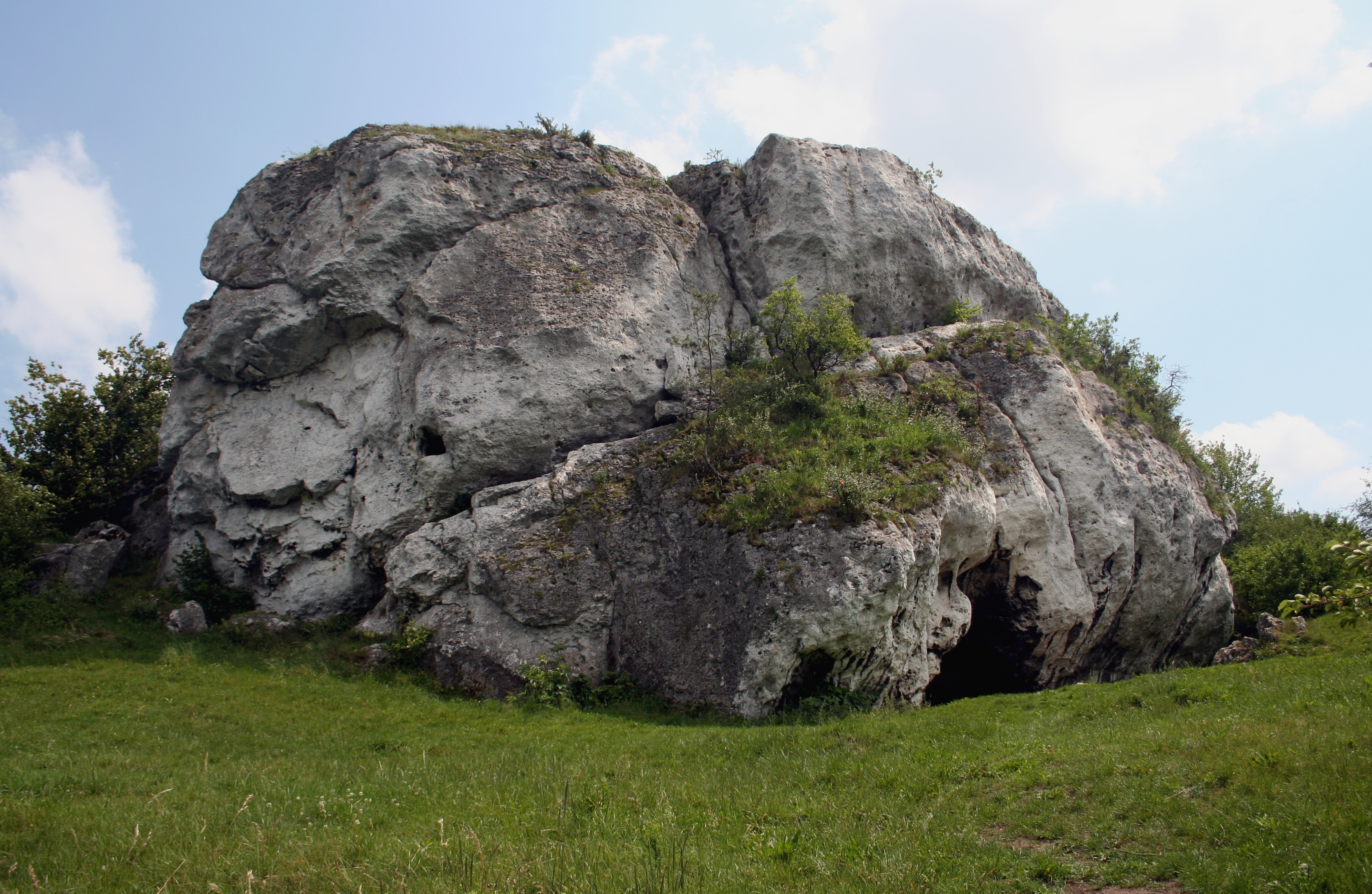 Jaskinia "Towarna" w Górach Towarnych